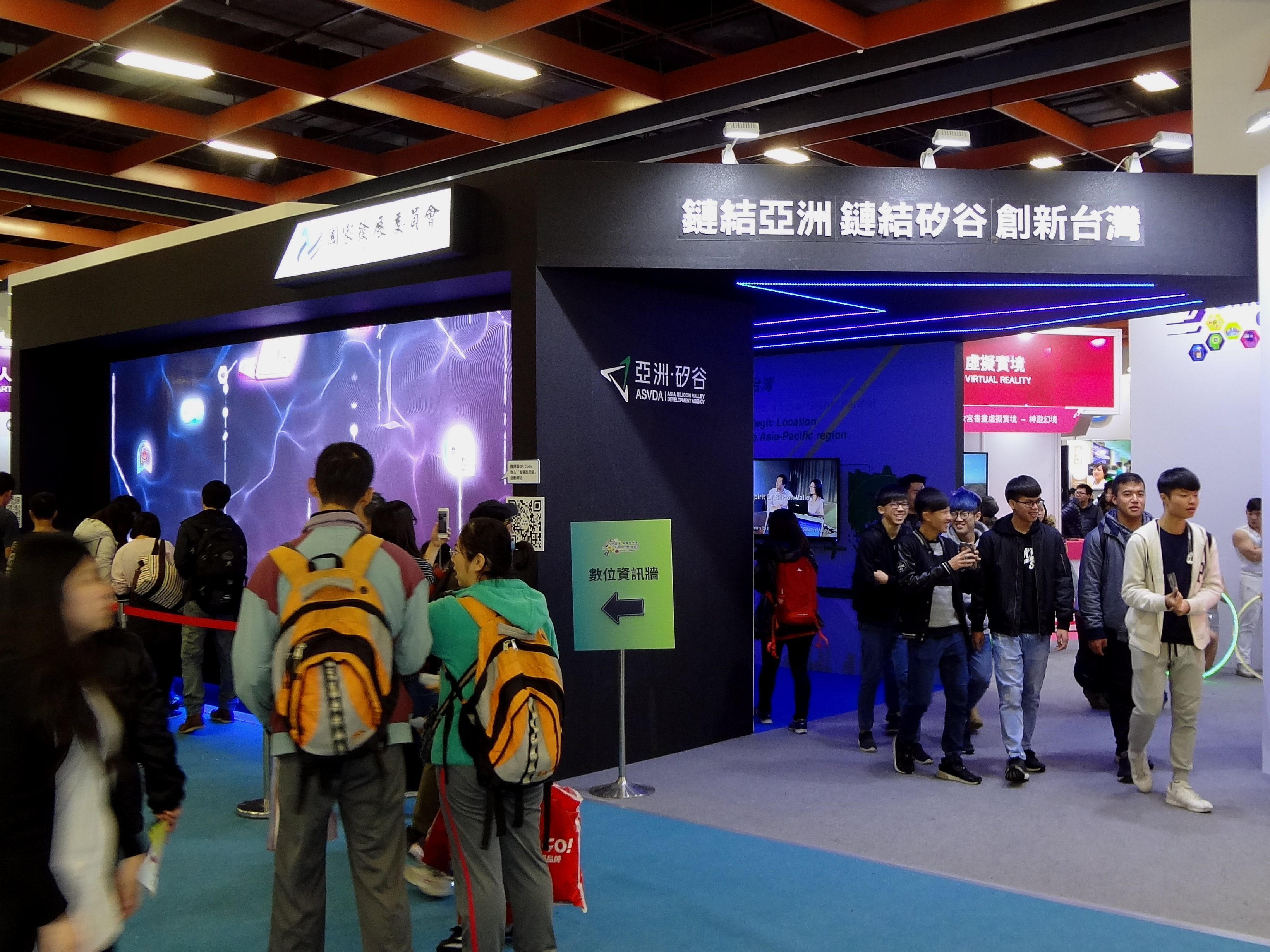 2017年台北資訊月，國家發展委員會設置的「亞洲·矽谷計畫」展區。